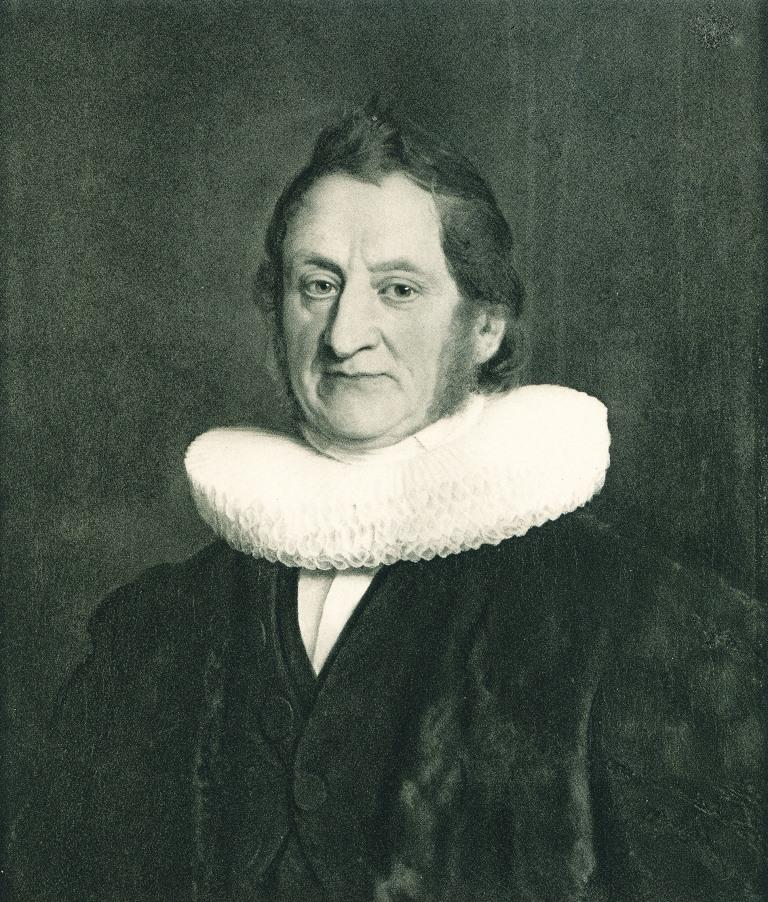 Porträt des Hamburger Bürgermeisters Nicolaus Binder.